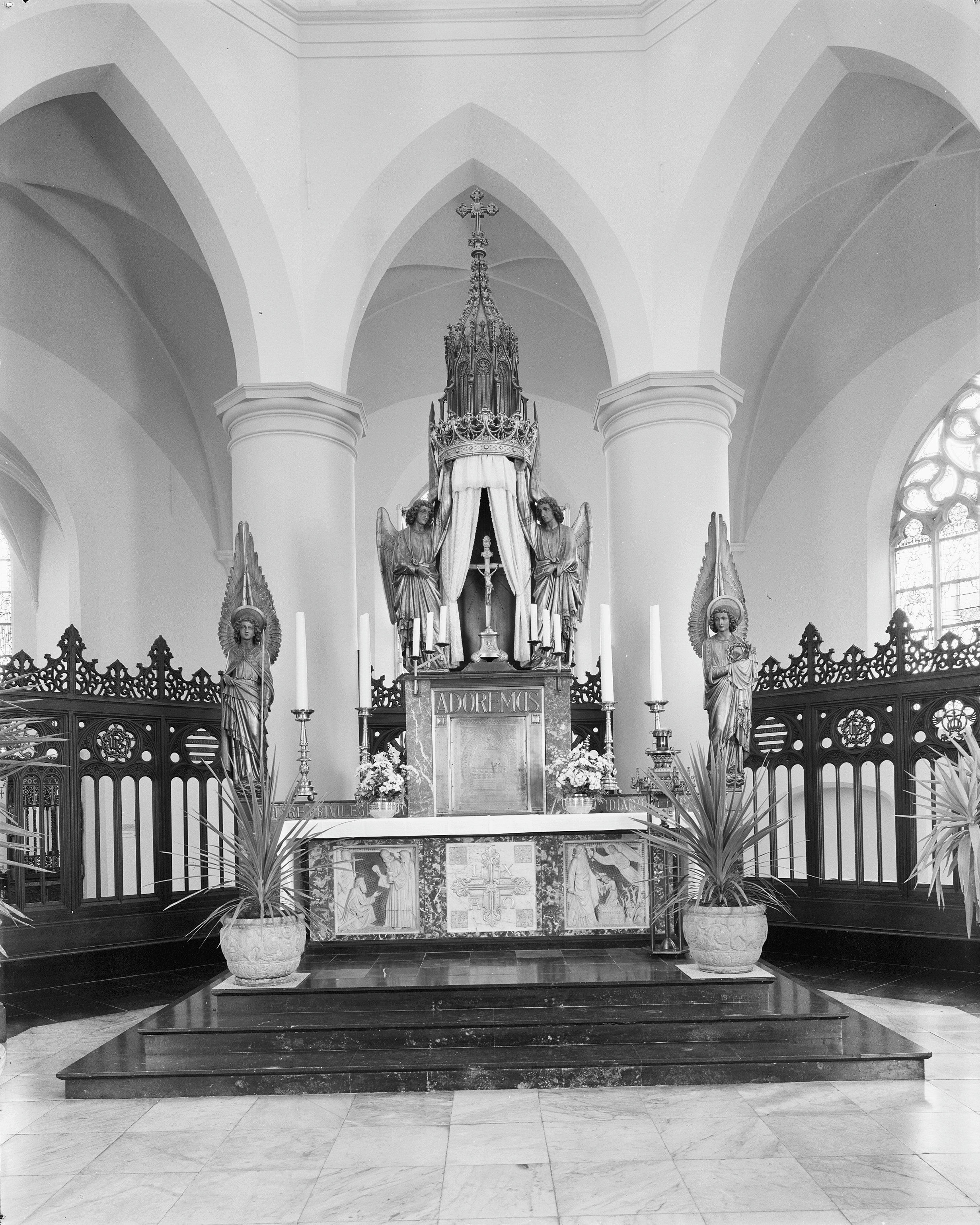 Sint Petruskerk: INTERIEUR, HOOGALTAAR